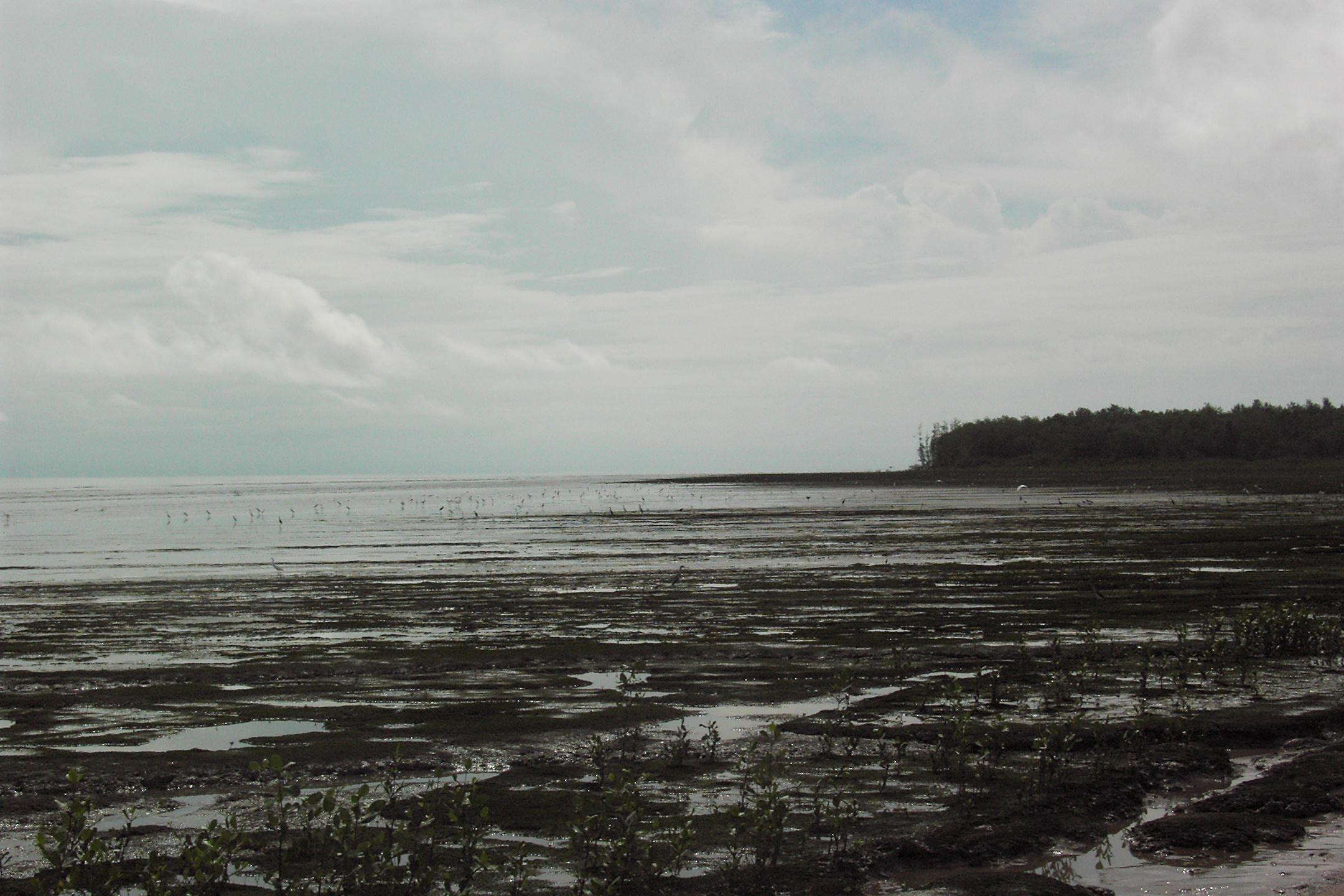 Pointe Isère, Réserve naturelle nationale de l'Amana